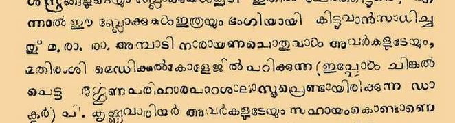 മരാര എന്ന ഉപയോഗം കാണിക്കുന്നതിനുള്ള ചിത്രം